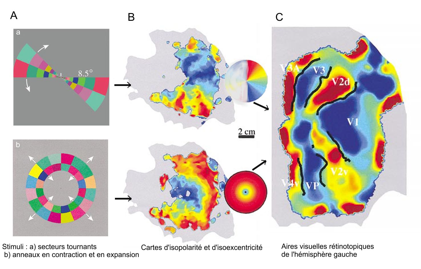 A : a)stimuli formés d'anneaux en expansion et contraction pour la carte d'isoexcentricité b) secteurs tournant dans le sens positif ou négatif pour la carte d'isopolarité B carte de phases d'isoexcentricité et d'isopolarité C carte rétinotopique de l'hémisphère gauche, d'après Warnking et al fMTI retinotopic mapping - step by step, NeuroImage, 17, 2002